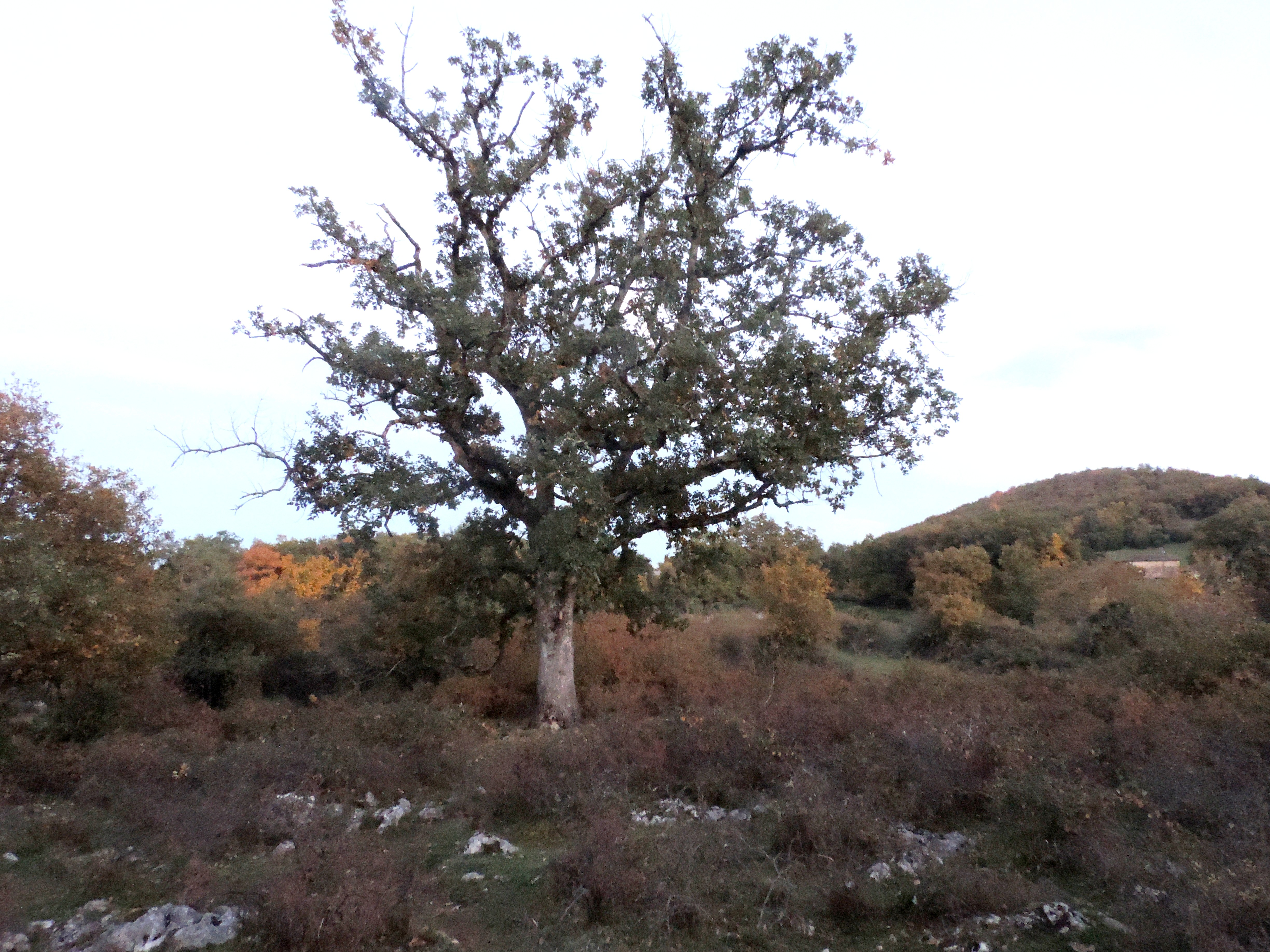 Le dolmen du Peyré et le trésor launacien du Peyré ont été découverts non loin de la métairie, sur la commune de Sabarat.